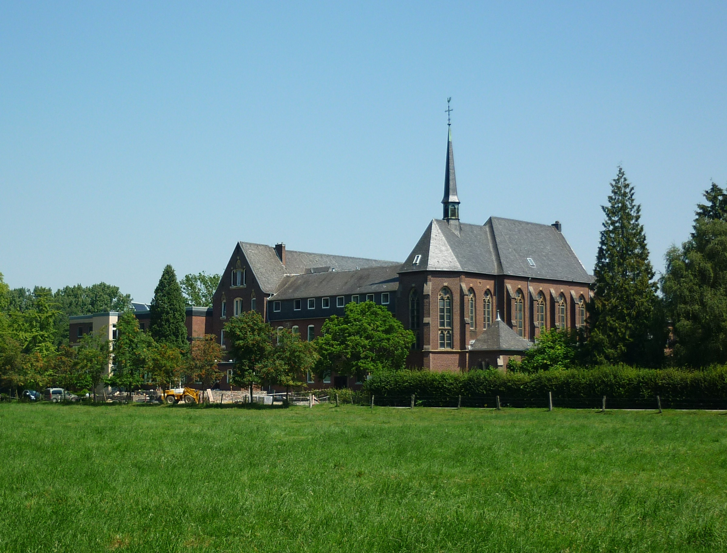 Abtei Mariendonk, Grefrath, Niederfeld 11